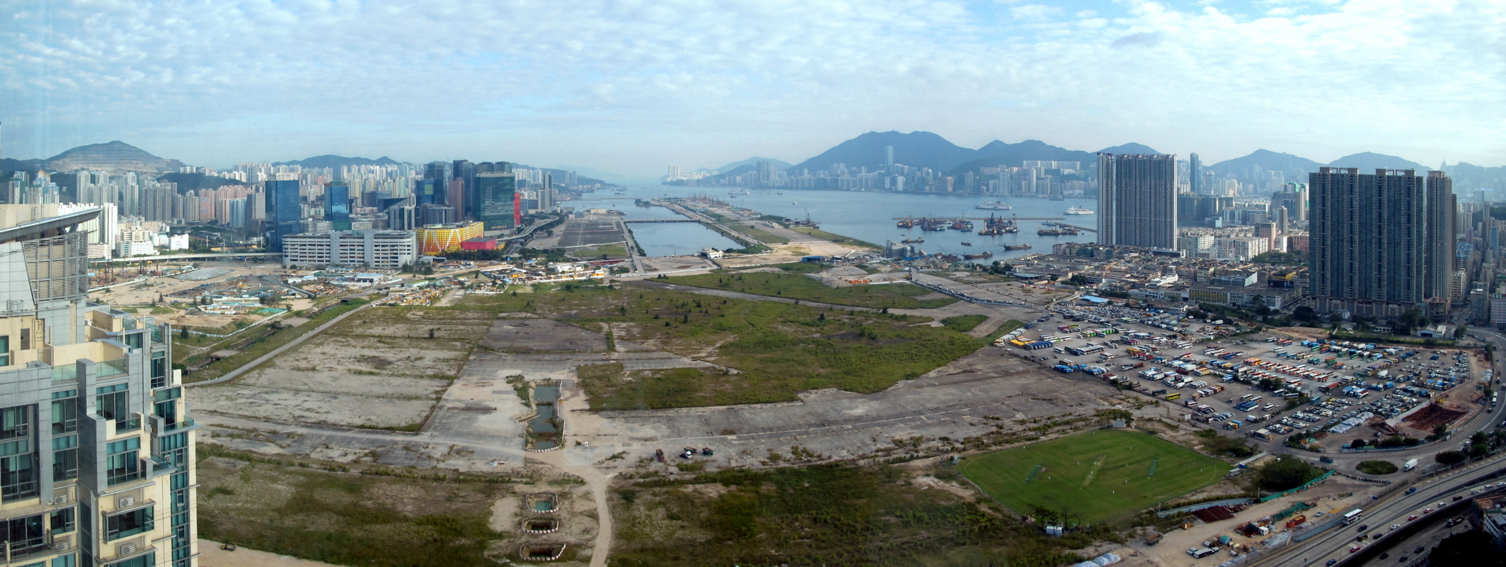 Kai Tak Airport Site Pano